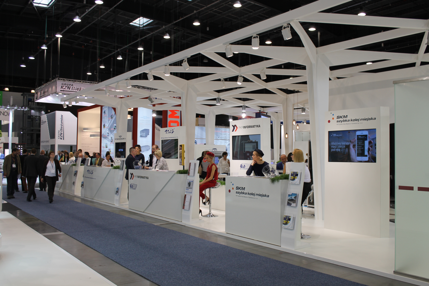 Stoisko Grupy PKP podczas targów Trako 2015. The making of this document was supported by Wikimedia Polska Association, within Wikigrant no. WG 2015-34. English | polski | +/−